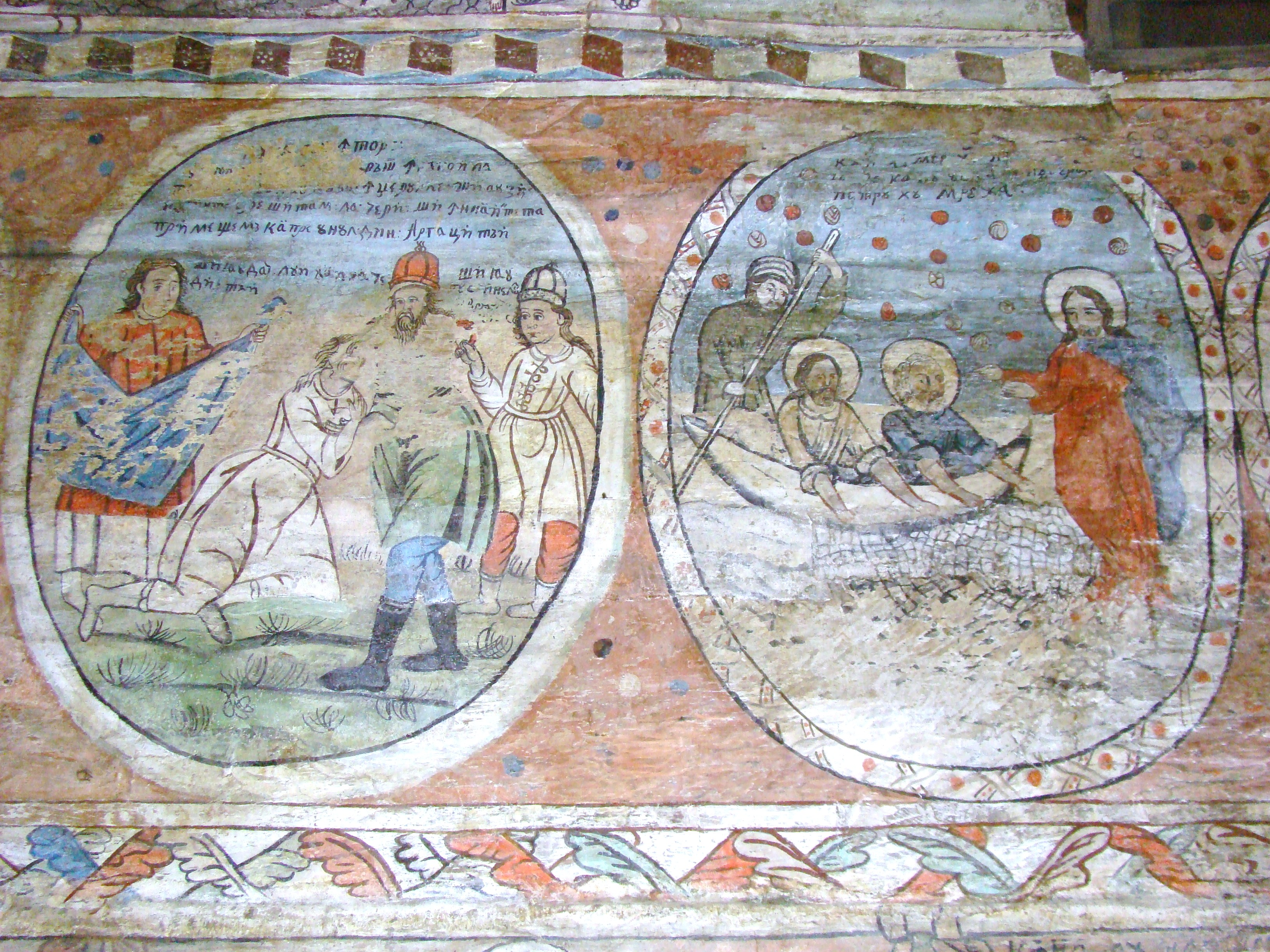 Biserica de lemn "Intrarea Maicii Domnului în Biserică" , sat BÂRSANA